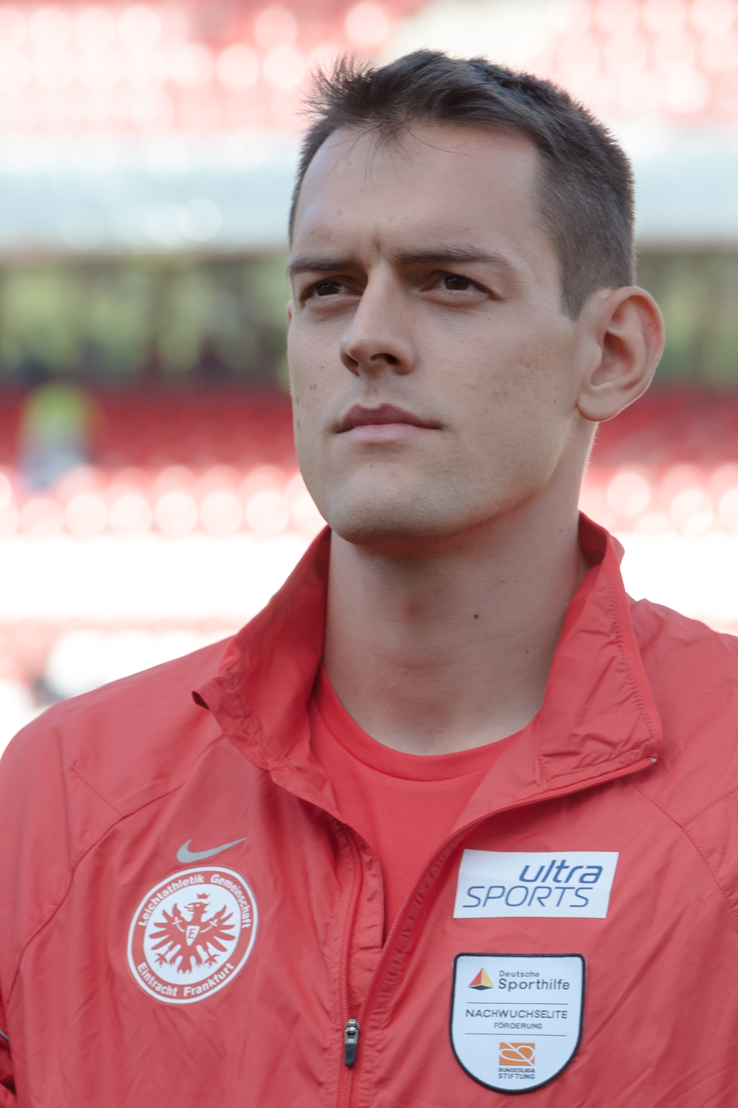 Deutsche Leichtathletik-Meisterschaften 2015: Georg Fleischhauer, LG Eintracht Frankfurt